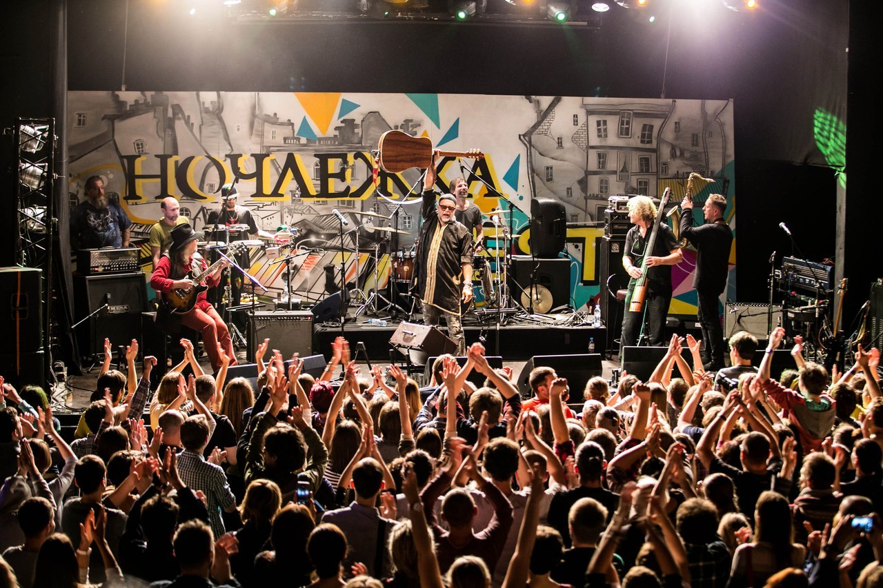 Рок-фестиваль НочлежкаFest в клубе Космонавт